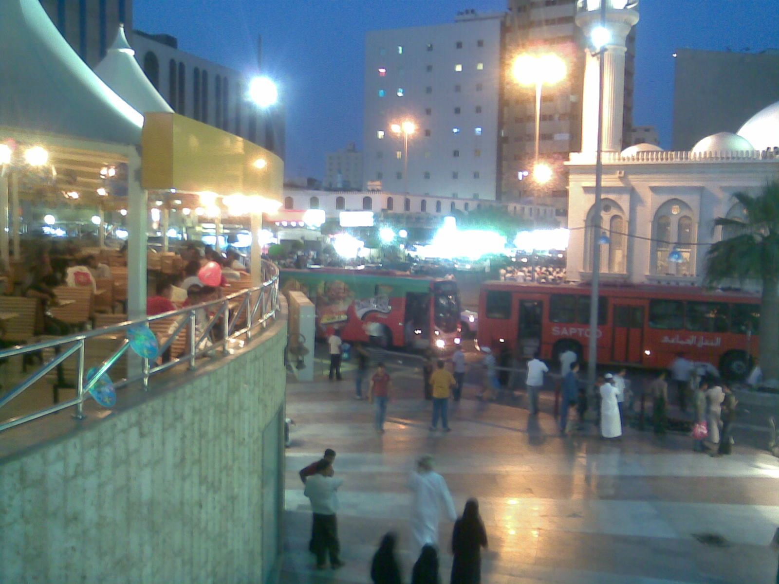 ജിദ്ദയിലെ അൽ-ബലദ്, രാത്രി ദൃശ്യം